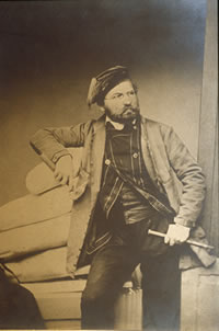 Ferdinand von Miller (* 18. Oktober 1813; † 11. Februar 1887), deutscher Erzgießer / German metalurgist